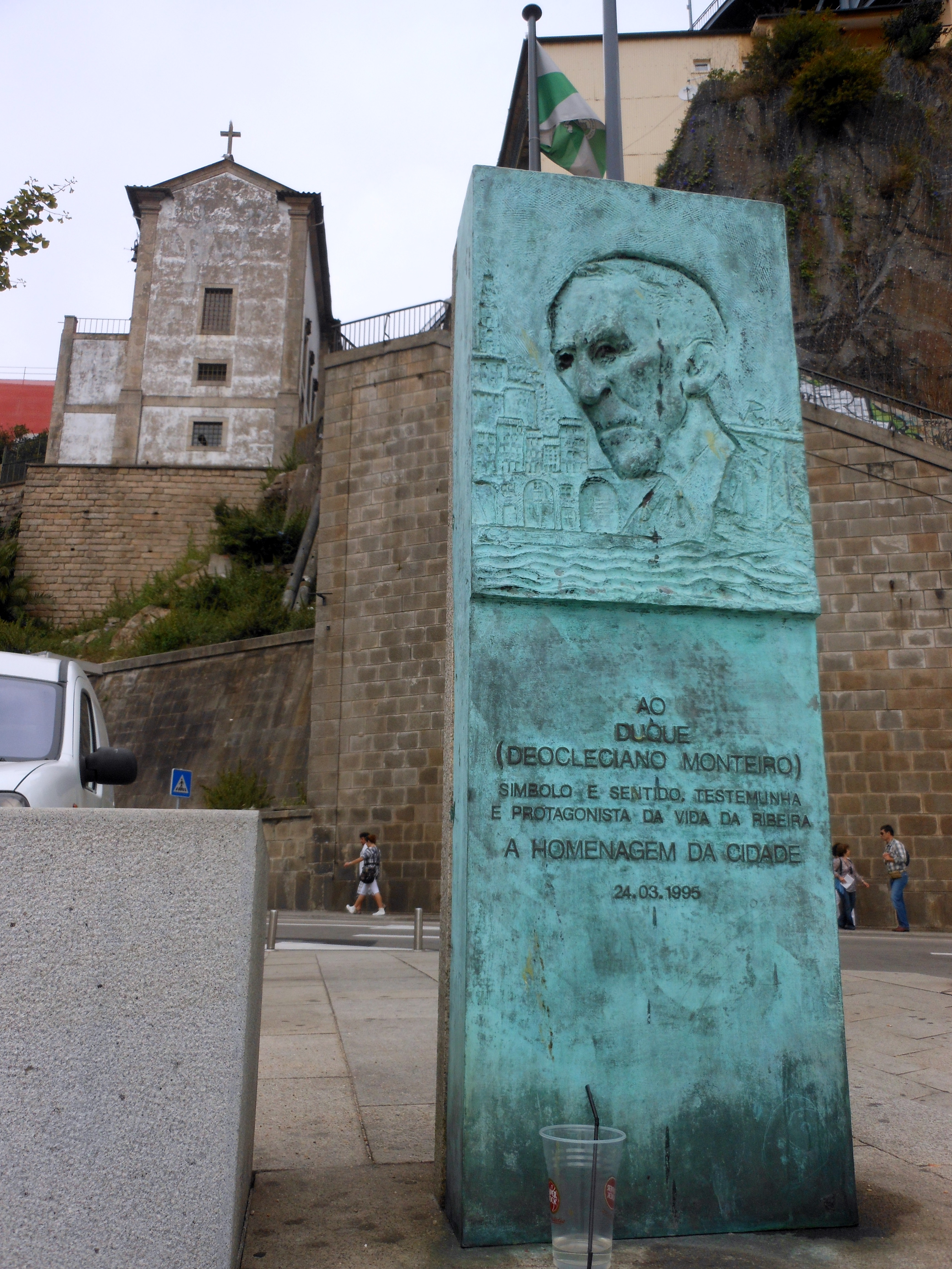 Monumento ao Duque da Ribeira, Porto, Portugal.